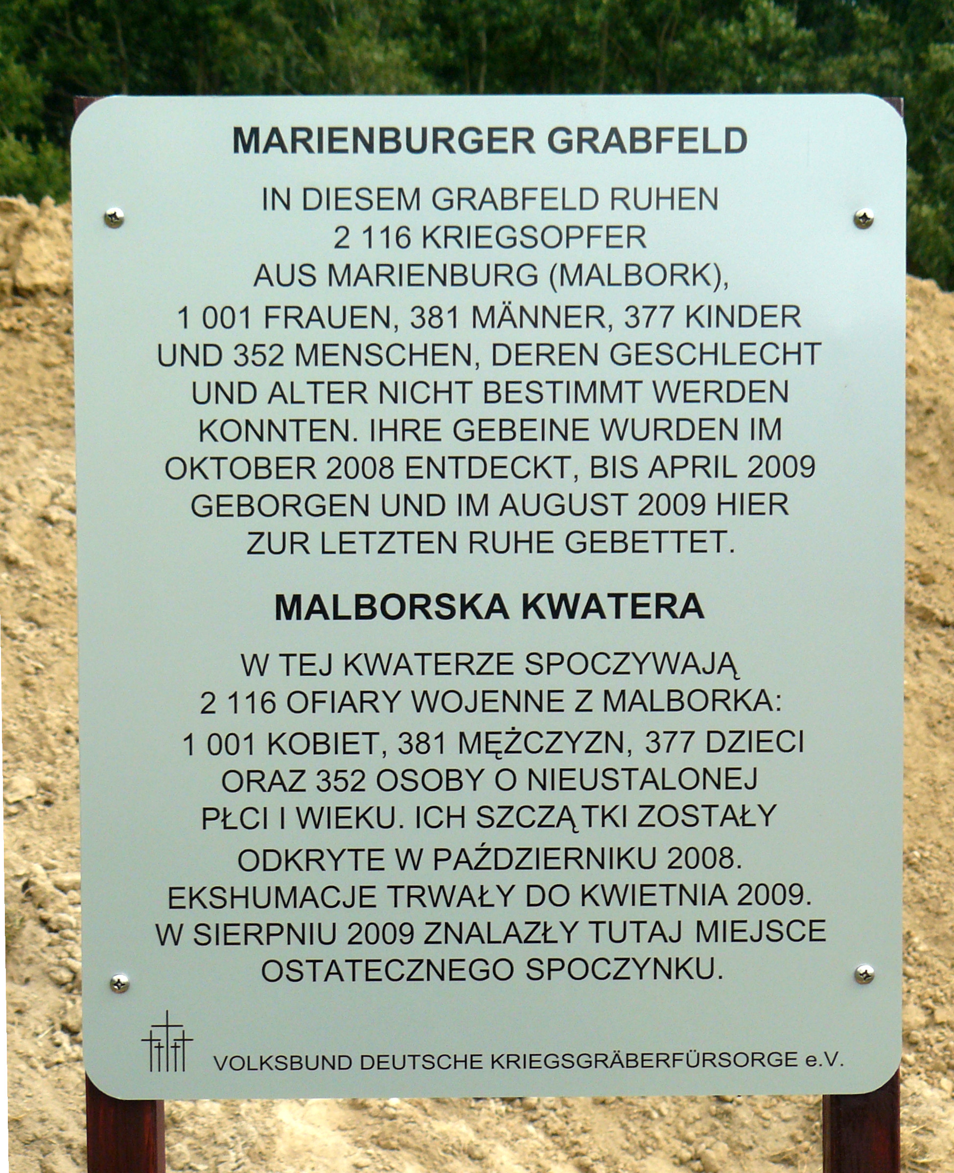 Infotafel am Marienburger Grabfeld auf dem deutschen Soldatenfriedhof in Glinna, Gemeinde Stare Czarnowo)